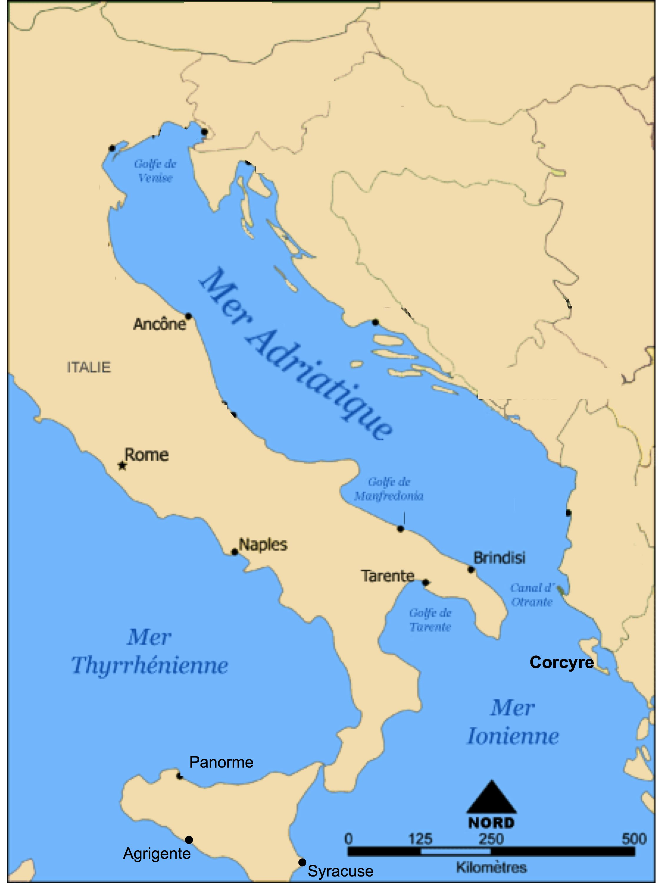 Carte générale de l'Adriatique avec quelques villes antiques